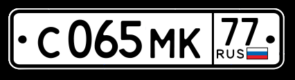 Plaque d´inmatriclation rusa